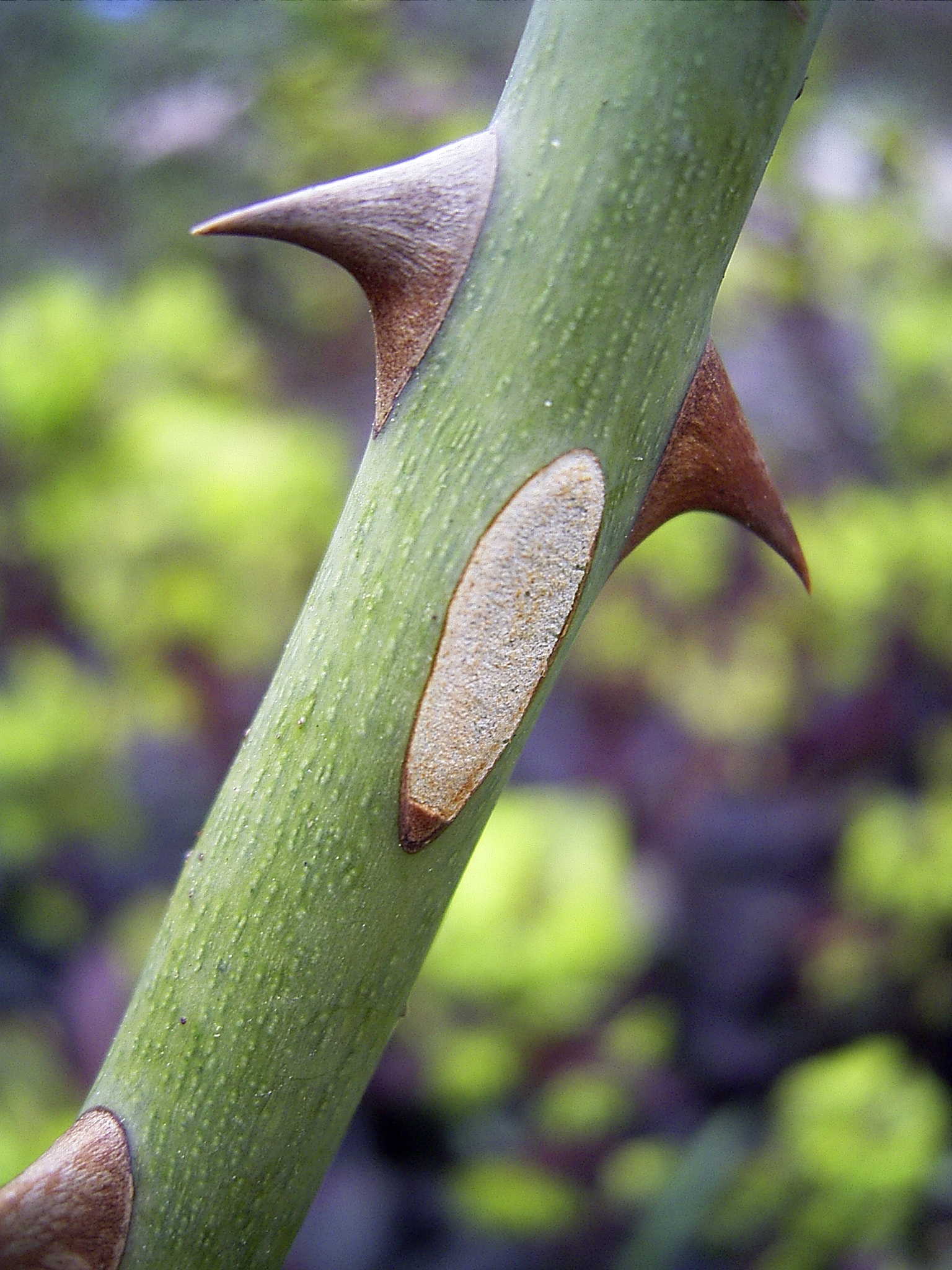 Rosenstacheln